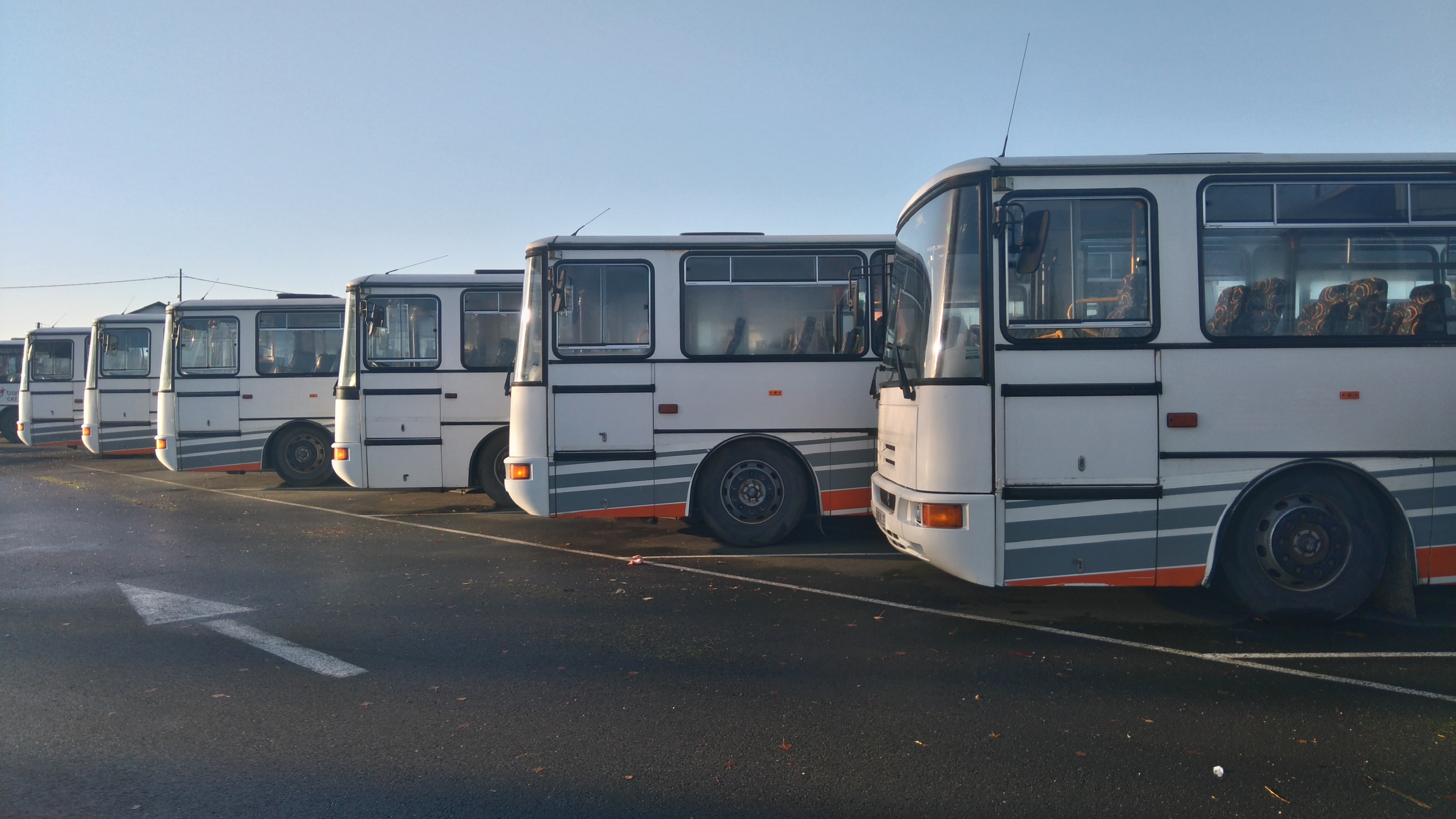 Renault Récréo C 935